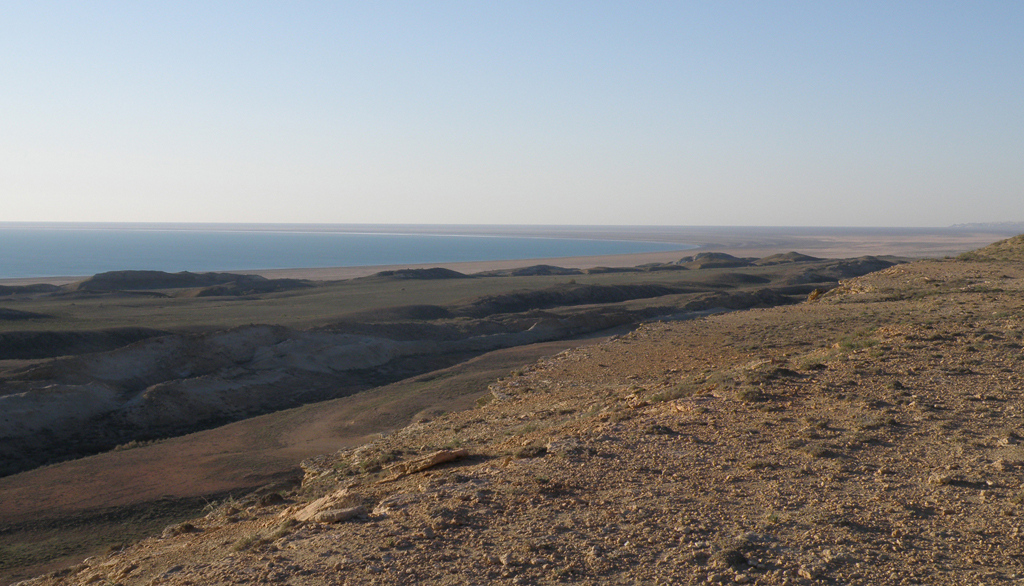 La partie méridionale de la Grande mer d'Aral en Ouzbékistan, mai 2012.